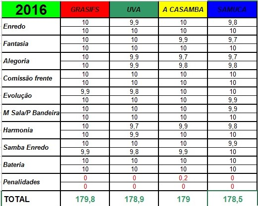 Notas das escolas de samba de Rio Claro no carnaval 2016